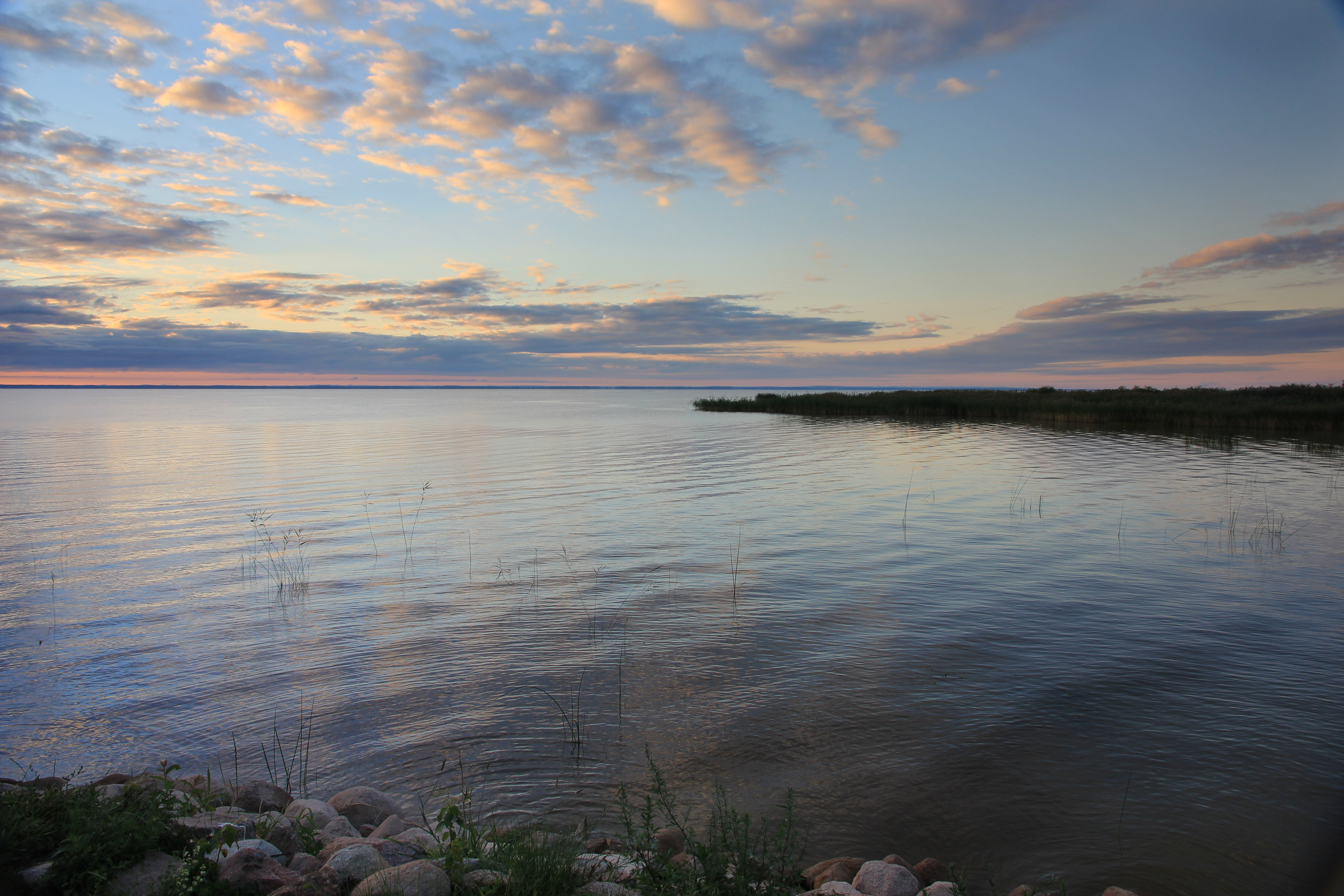 Võrtsjärv